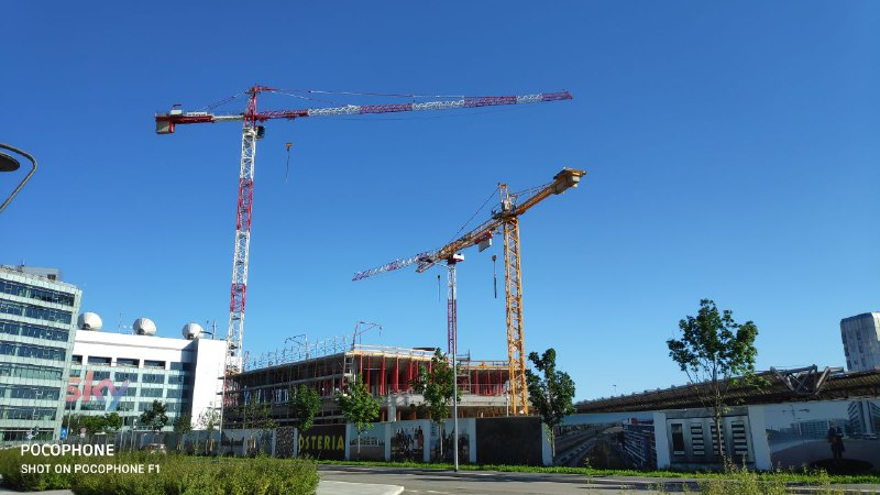 Cantiere Spark 1 a Santa Giulia Milano 20 giugno 2020